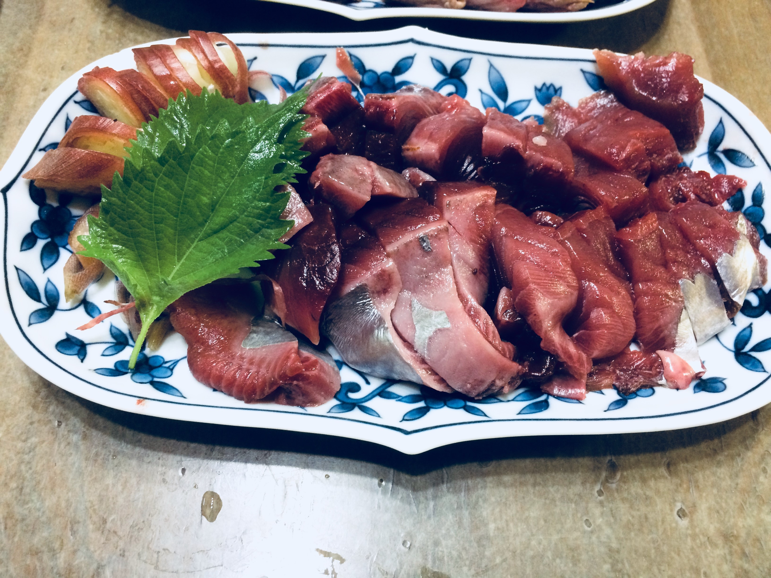 ヒラソウダ（高知県室戸岬産）の刺身。左に大葉・刻みミョウガをそれぞれ薬味として付けている。皮を剥いたすぐ下の肉に白い層があり、皮下脂肪が豊富に含まれていることがわかる。2018年5月10日撮影。